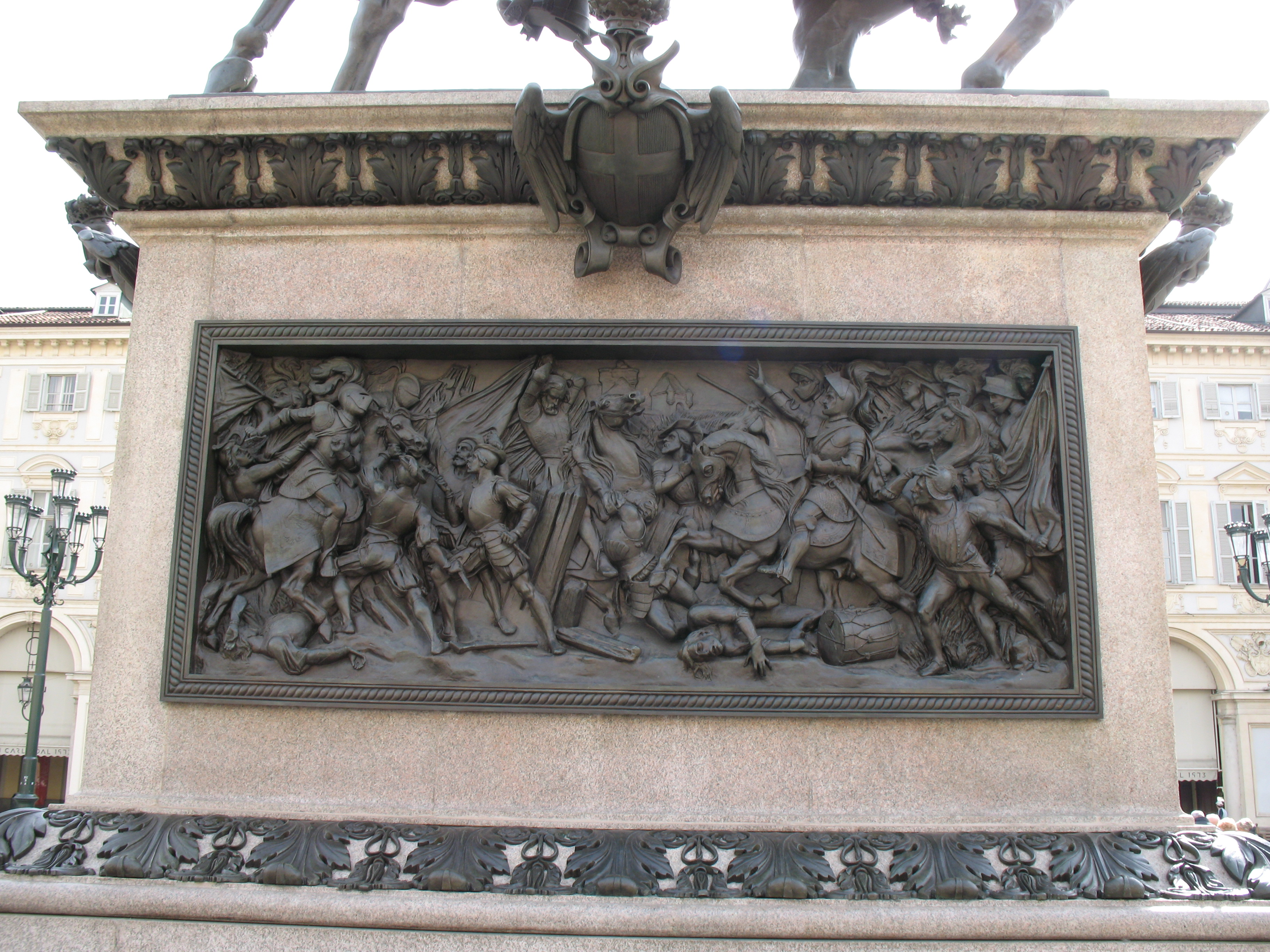 Statua equestre ad Emanuele Filiberto di Savoia - Piazza san Carlo - Torino - Italy